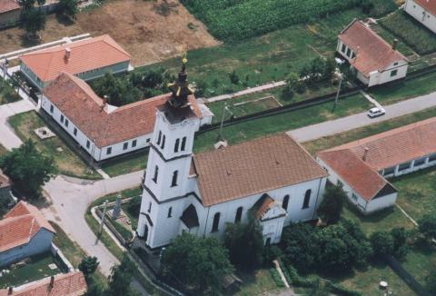 Esztár, Hungary, aerialphotography